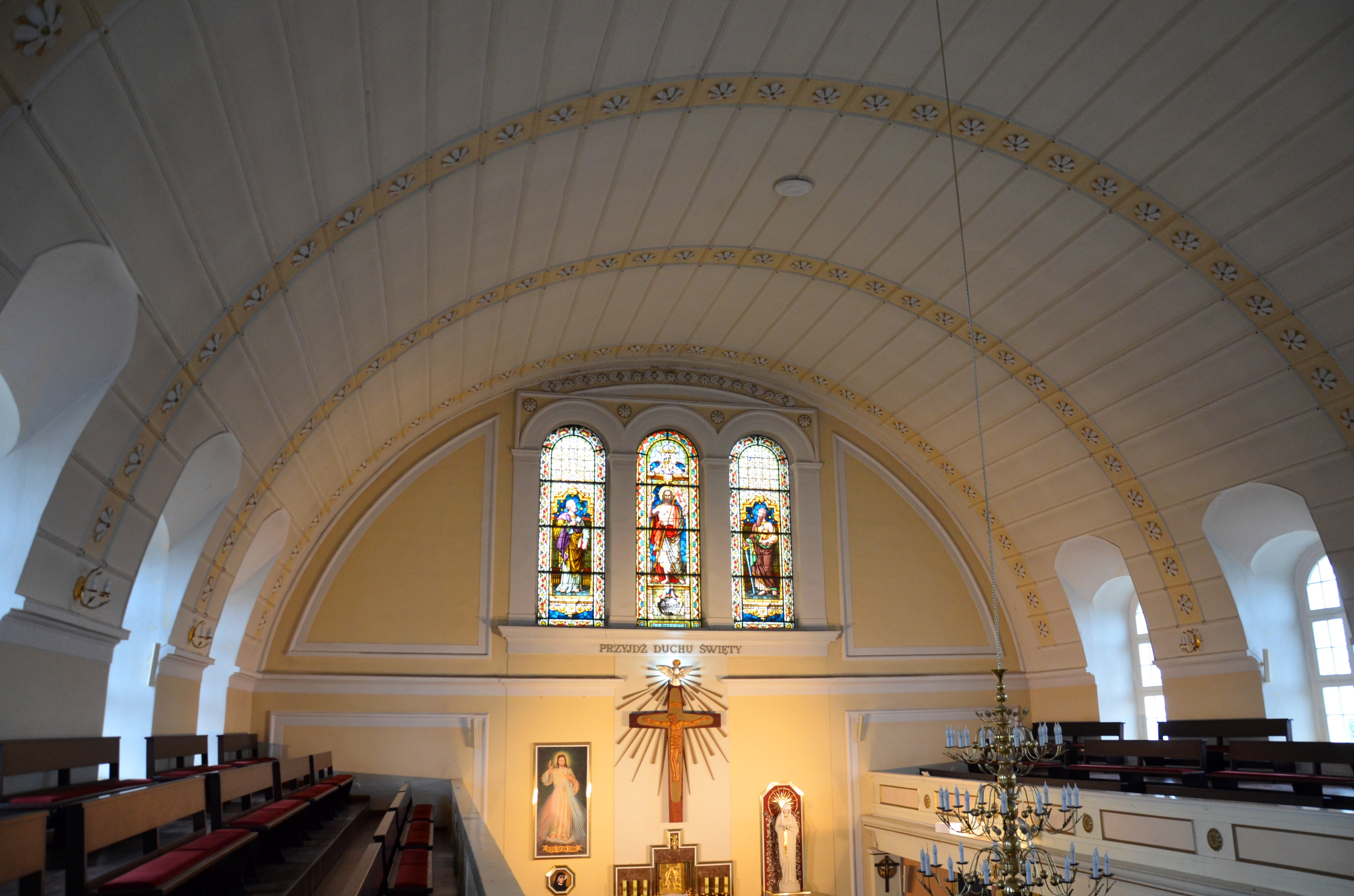 Rogoźno, kościół ewangelicki, ob. rzym.-kat. par. p.w. Św. Ducha, 1808-1817